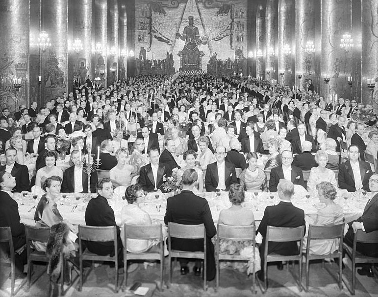 Nobelmiddag i Gyllene salen, Stadshuset, Hantverkargatan 1